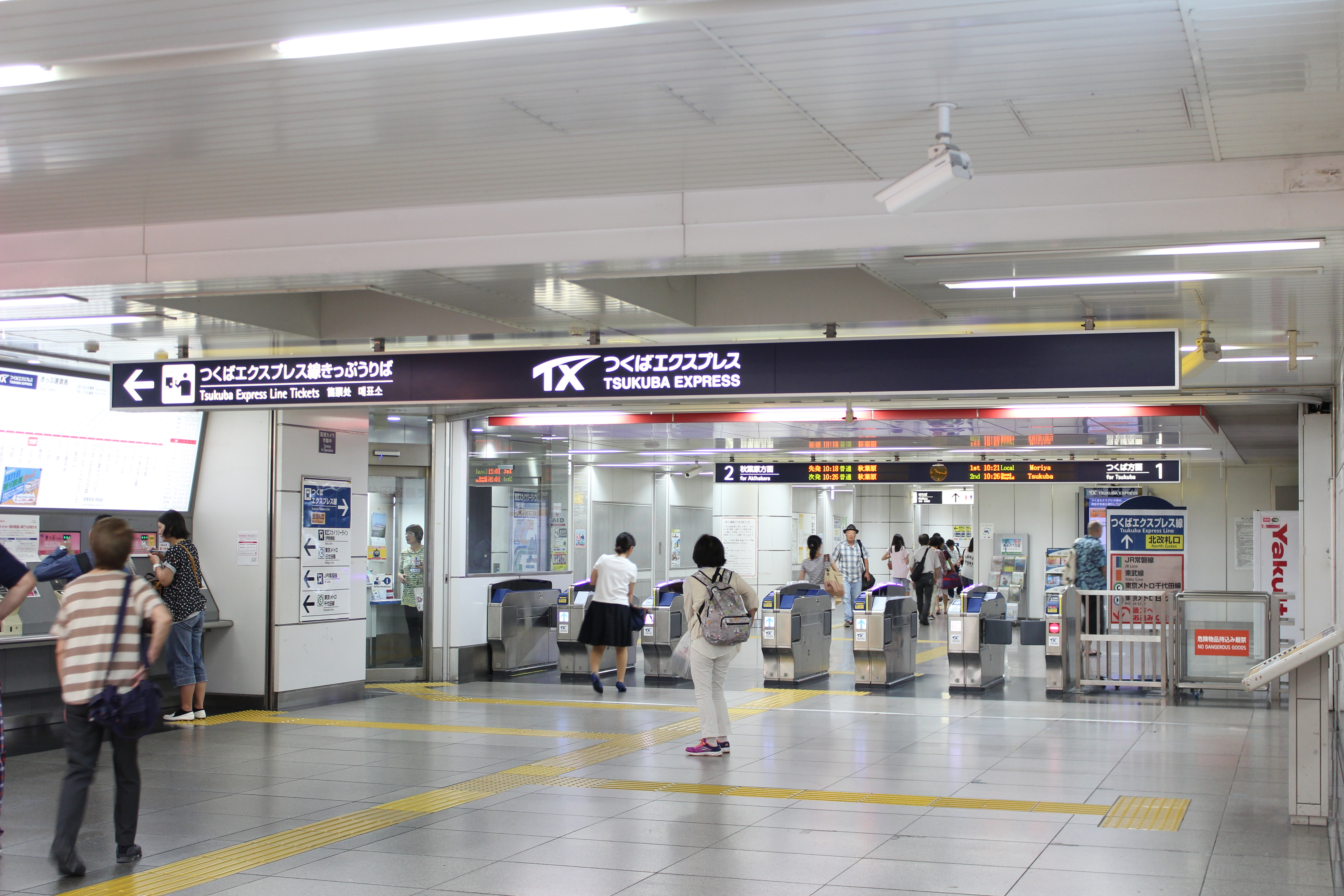 TX北千住駅中央改札口